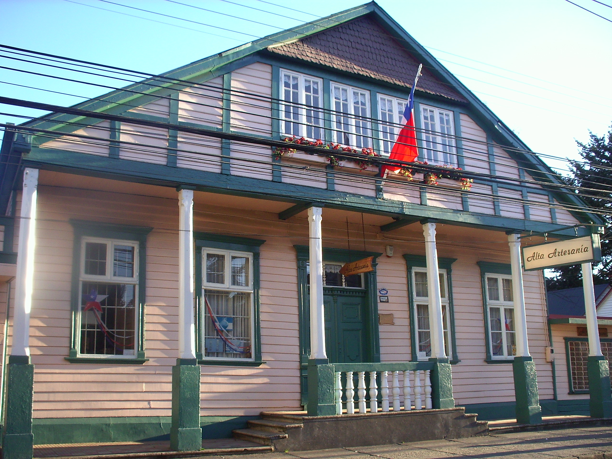 Casa de Federico Stückrath This is a photo of a national monument in Chile: 717